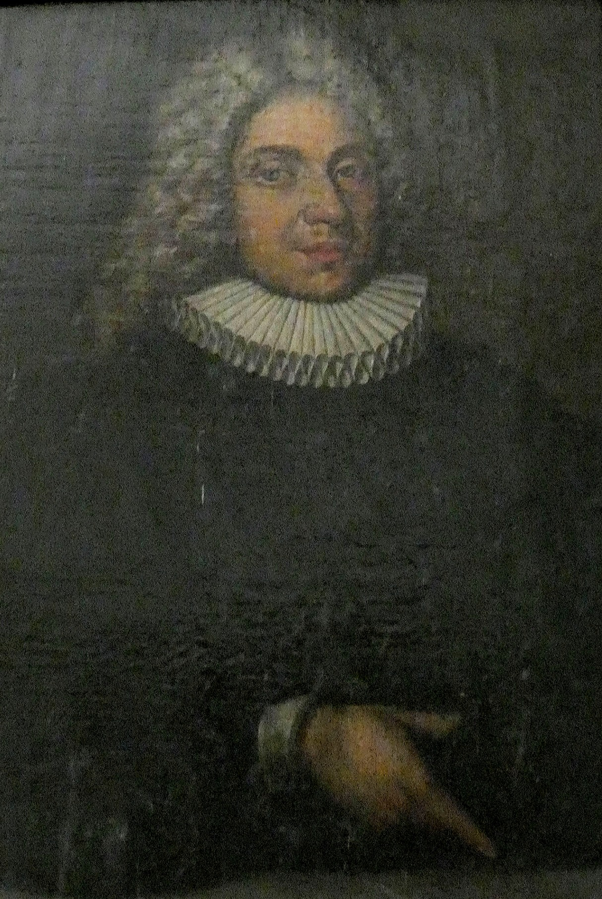 Fotografische Reproduktion (bearb.) eines Porträtgemäldes des Oberpfarrers der Marktkirche Halle Johann Michael Heineccius